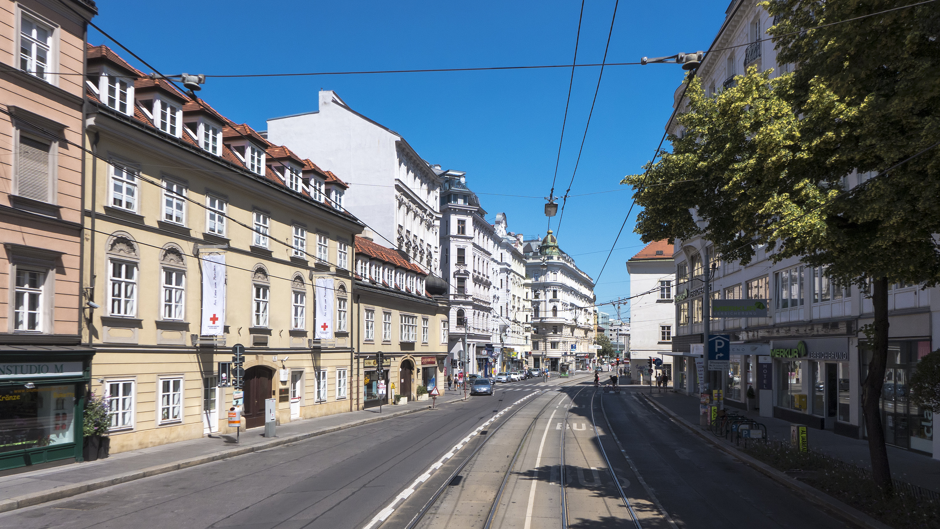 Wiedner Hauptstraße in Wien 4 bei der Mozartgasse Richtung Norden